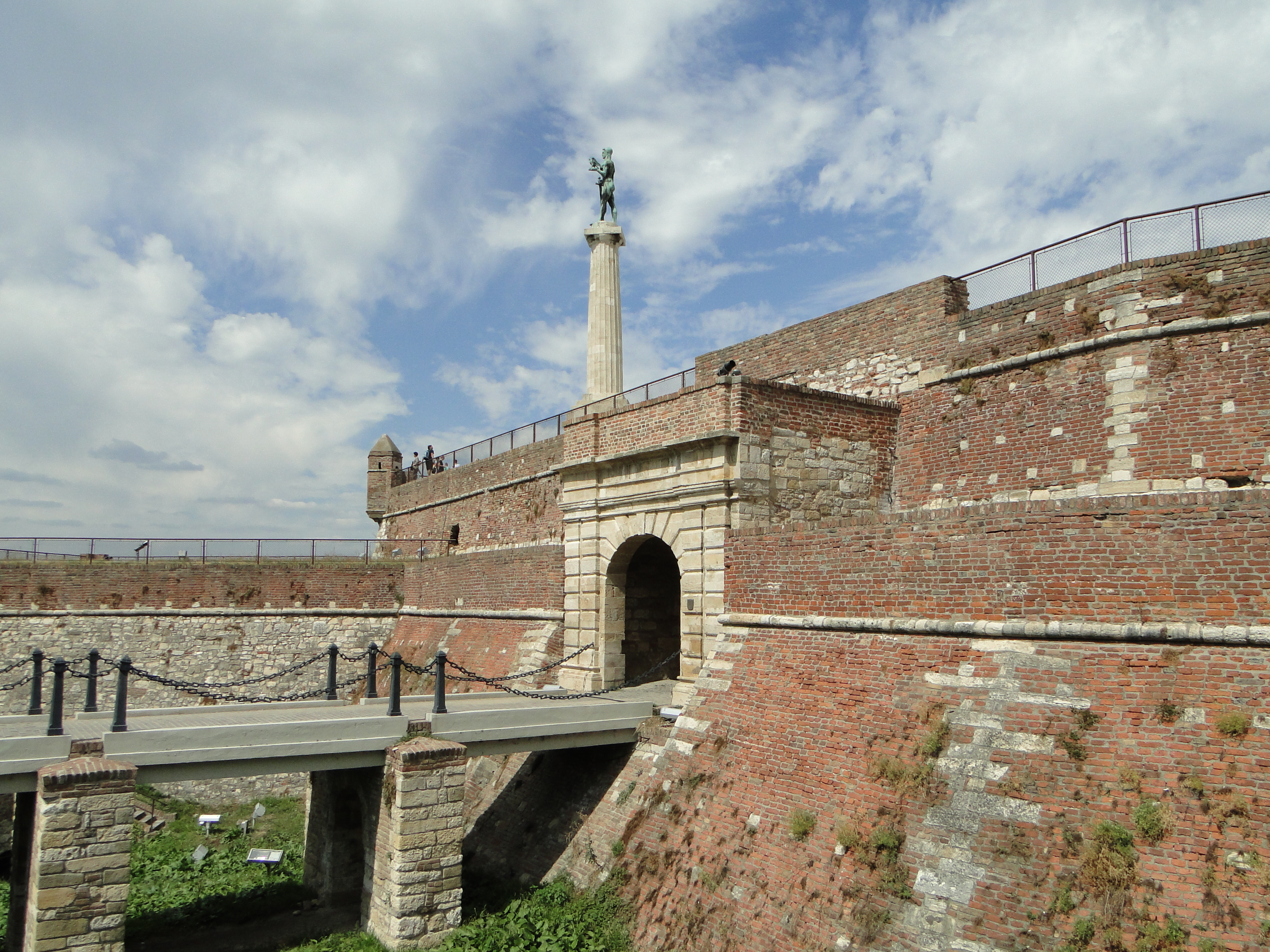 Beograd 2013